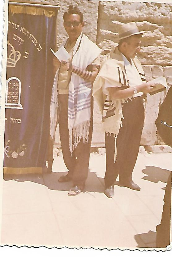 משה קהירי בכותל המערבי